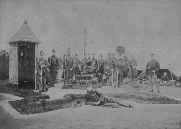 foto. Militairen van het vijfde bataljon van het KNIL poseren bij een wachtpost van riet of bamboe en de op de grond uitgezette contouren van een Nederlands fort